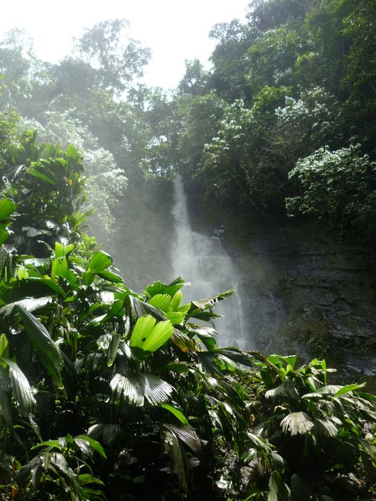 Tomado de un miembro aportante de Topaipí